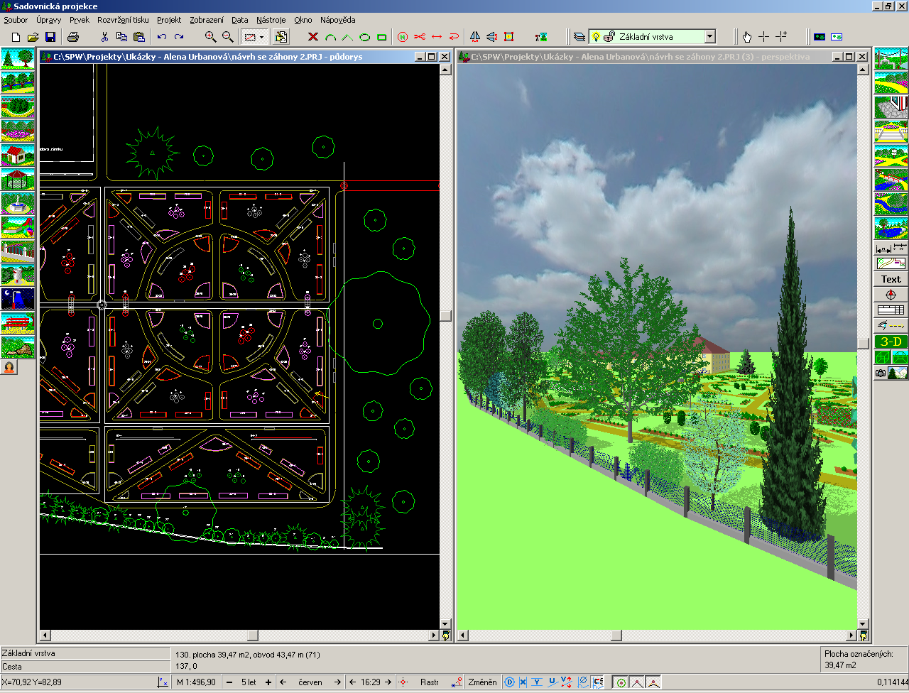 Sadovnická projekce je CAD software původně vyvíjený v ČR původně pro DOS Karlem Rysem ve spolupráci s Českou zahradnickou akademií Mělník.